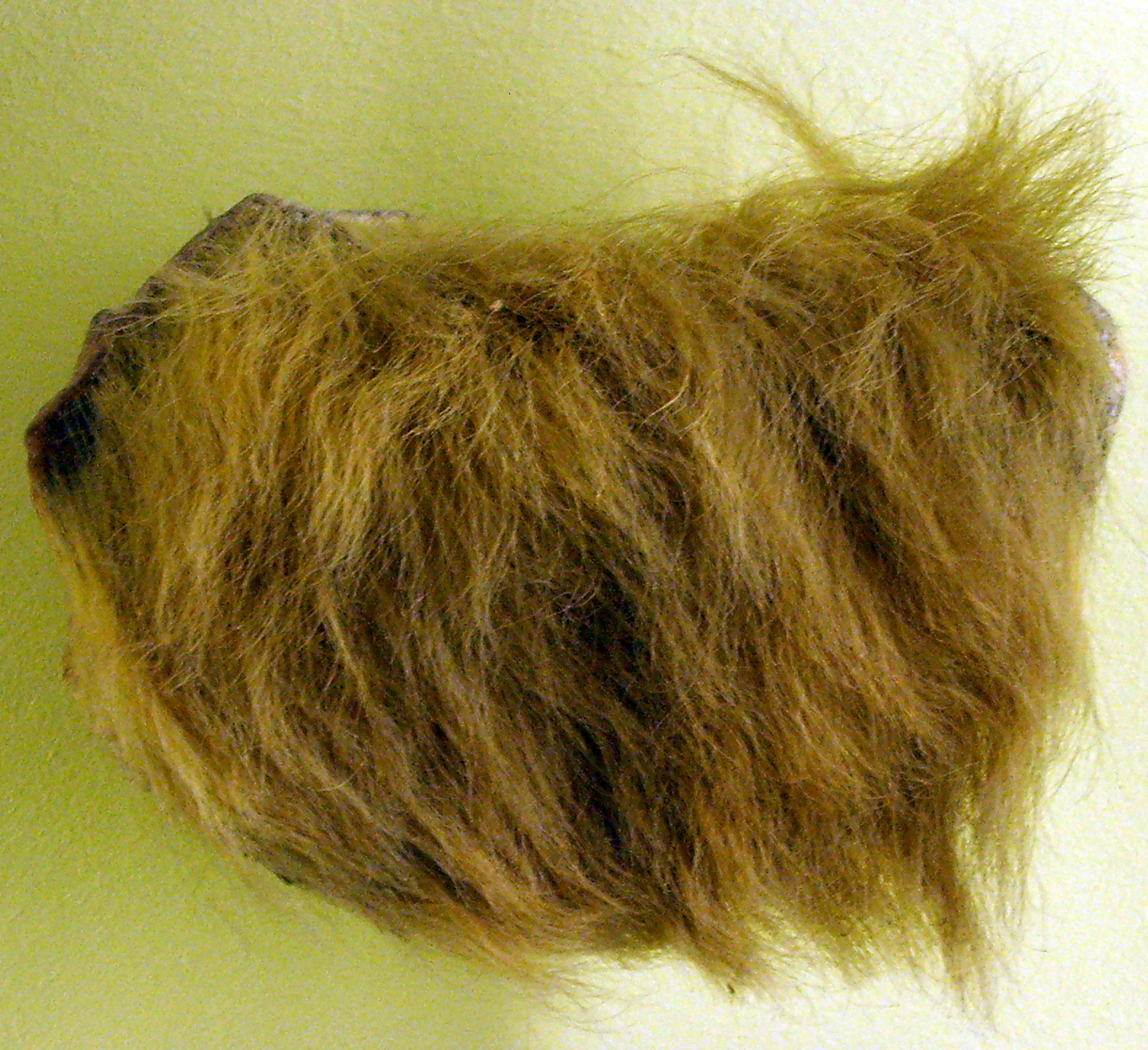 Mylodon darwini skin and fur at the Museum für Naturkunde, Berlin.